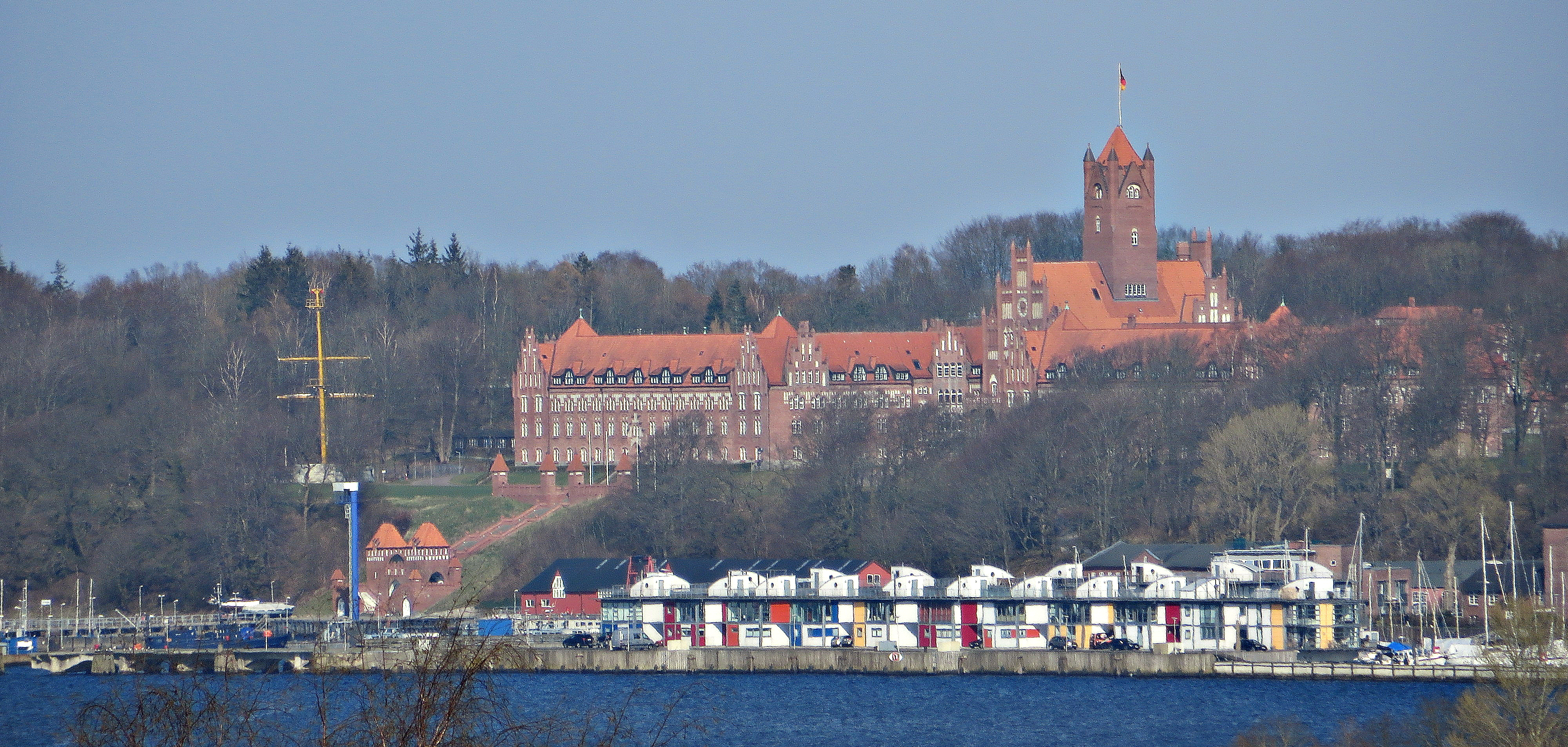 Sonwik, MSM und Gorch-Fock-Übungsmast (Mürwik März 2014), Bild 04